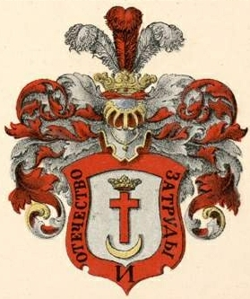 Troštšinski suguvõsa aadlivapp